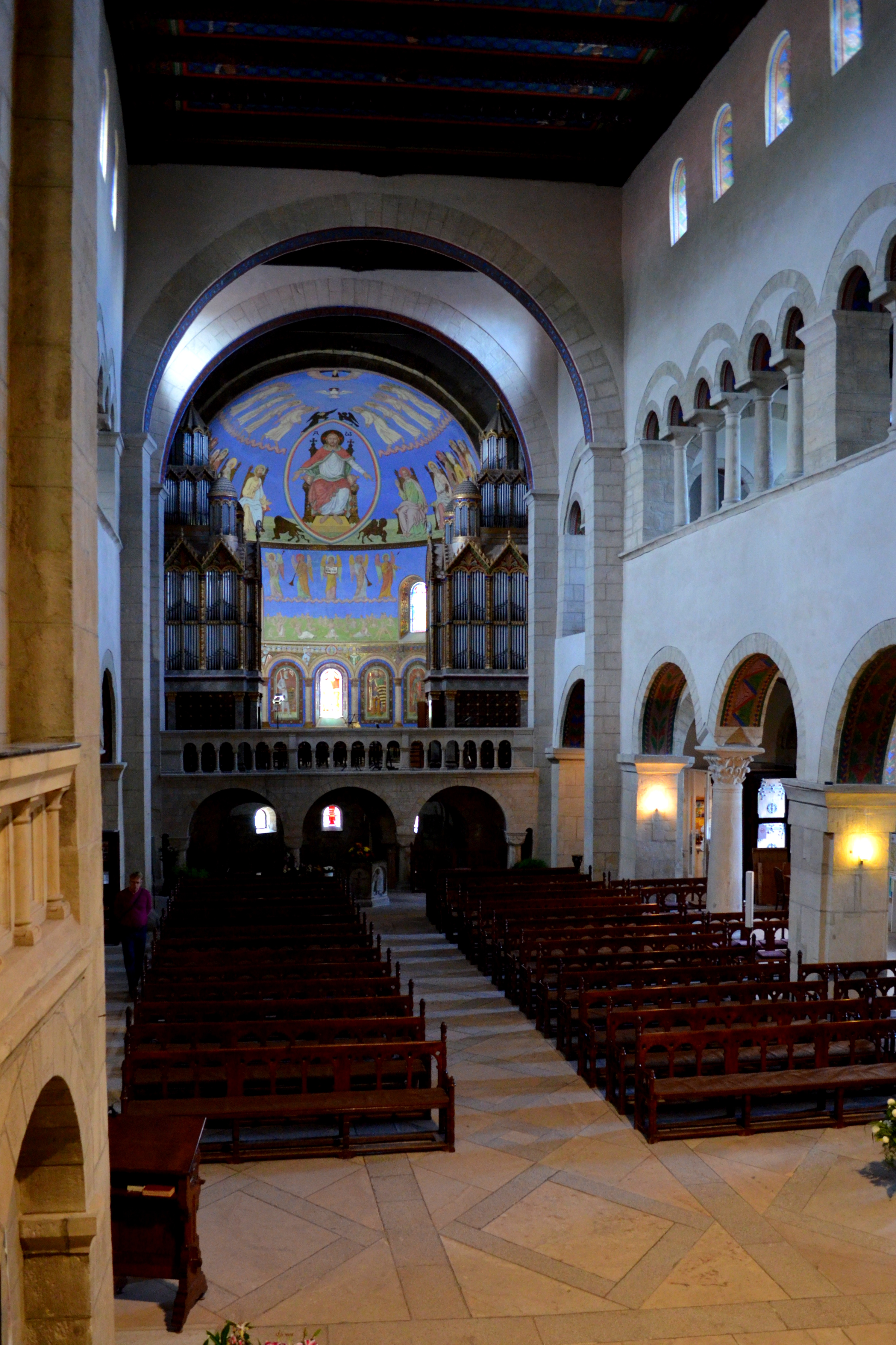 Stiftskerk Sint-Cyriacus